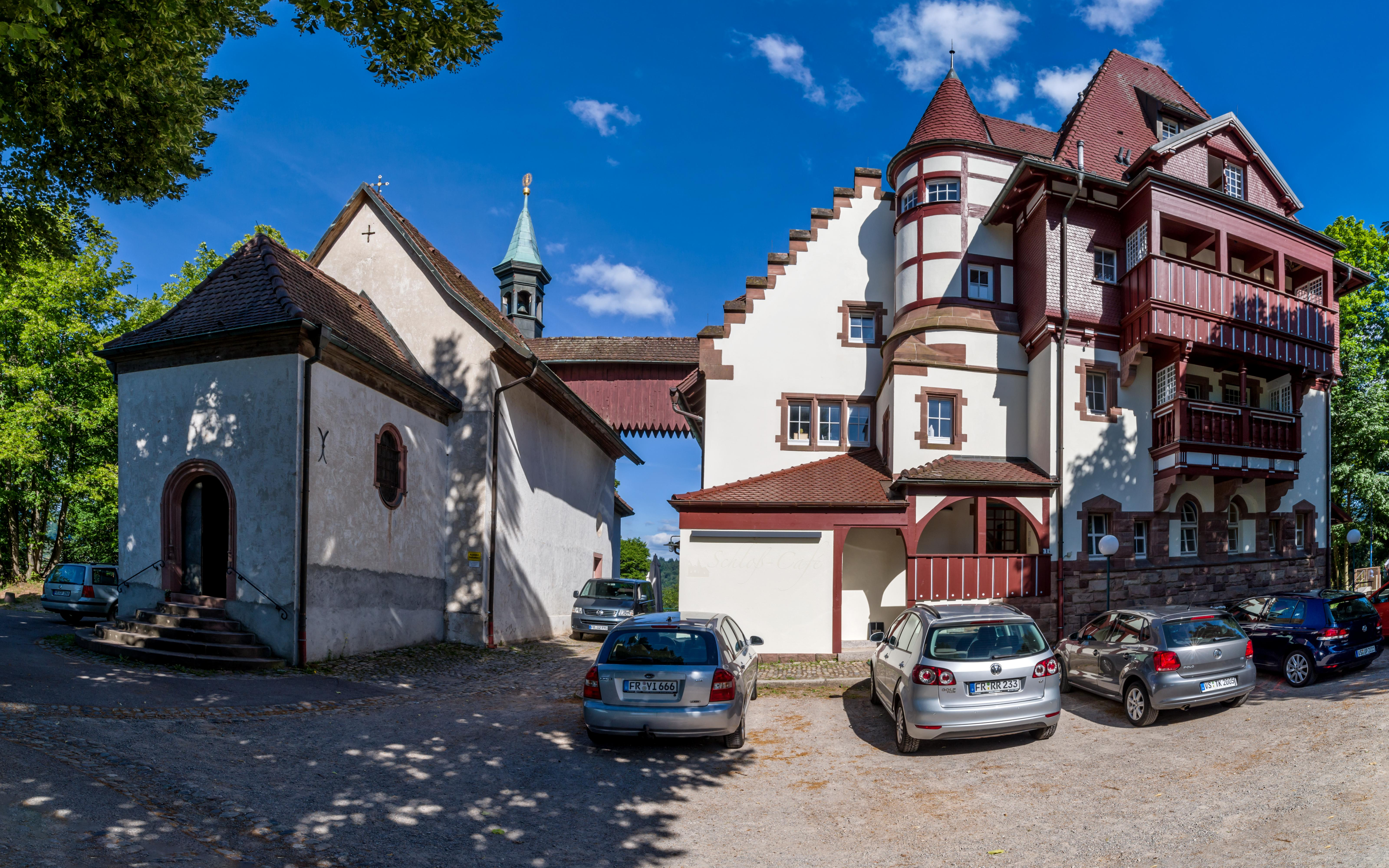 Bilder aus Freiburg Die Lorettokapelle und der Lorettoberg sowie die Umgebung